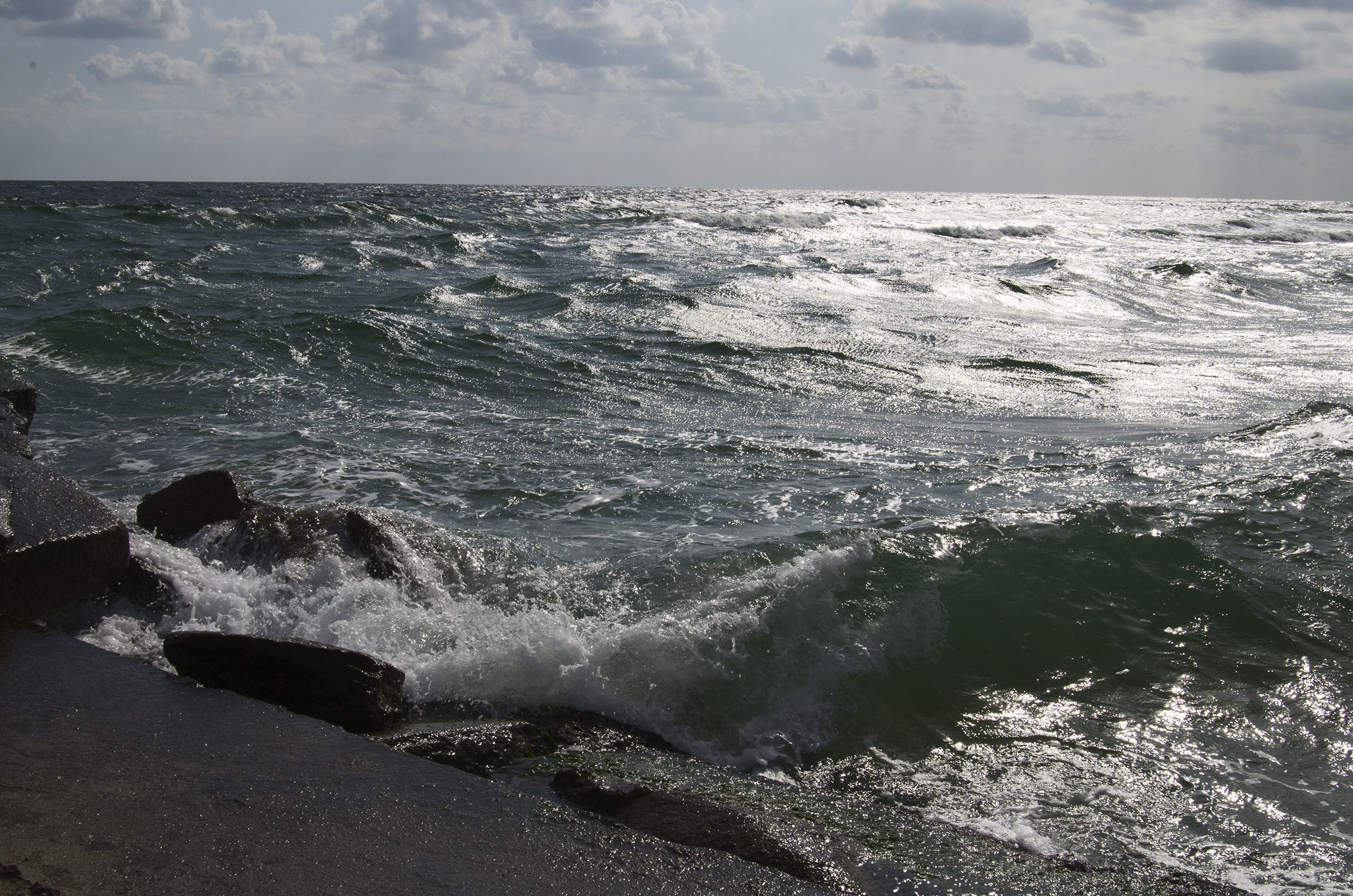 Чёрное море / Black sea